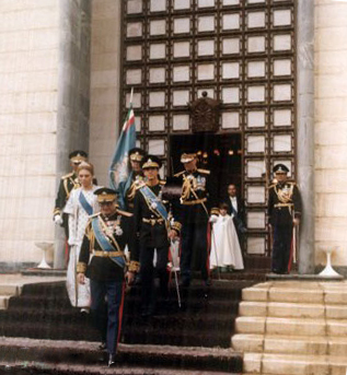 Reza Shah's mausoleum